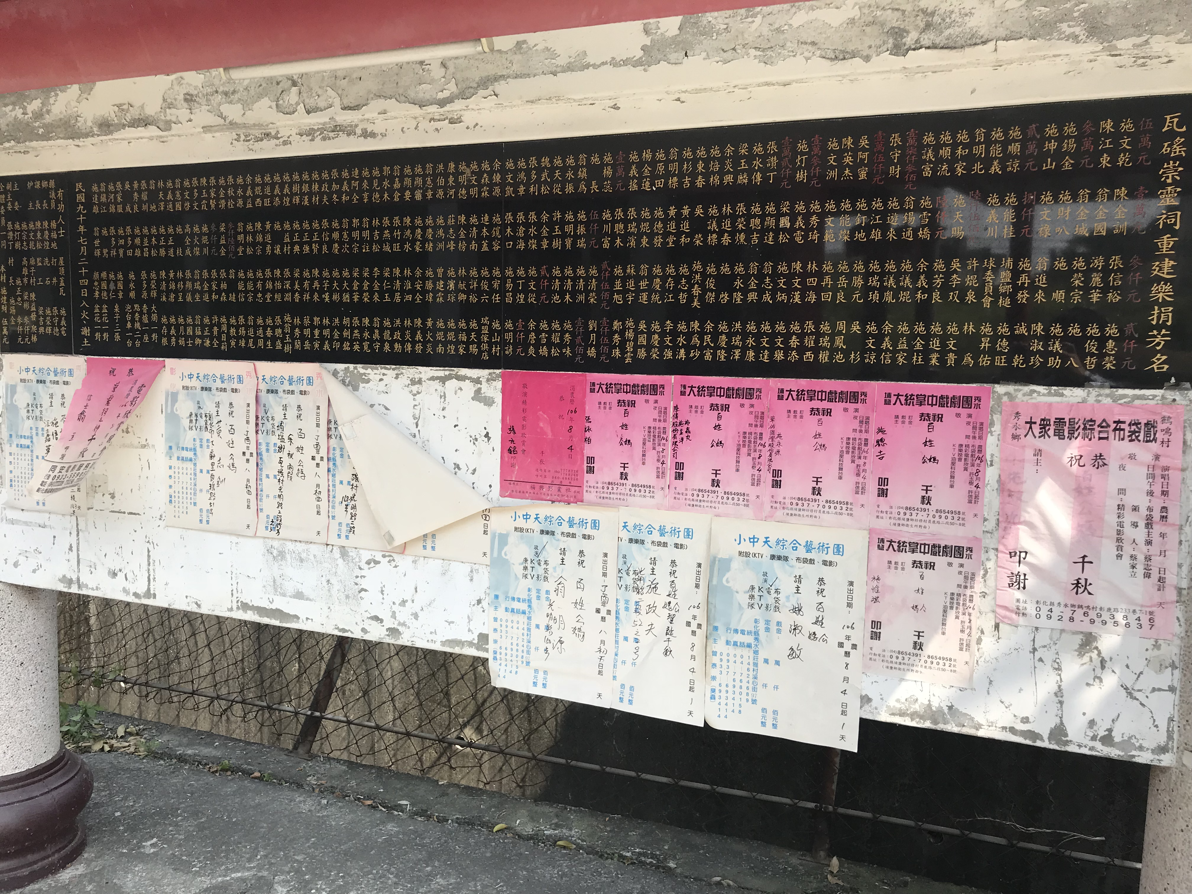 中文（台灣）: 瓦磘崇靈祠重建芳名錄